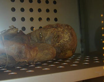 Momia de San Andrés